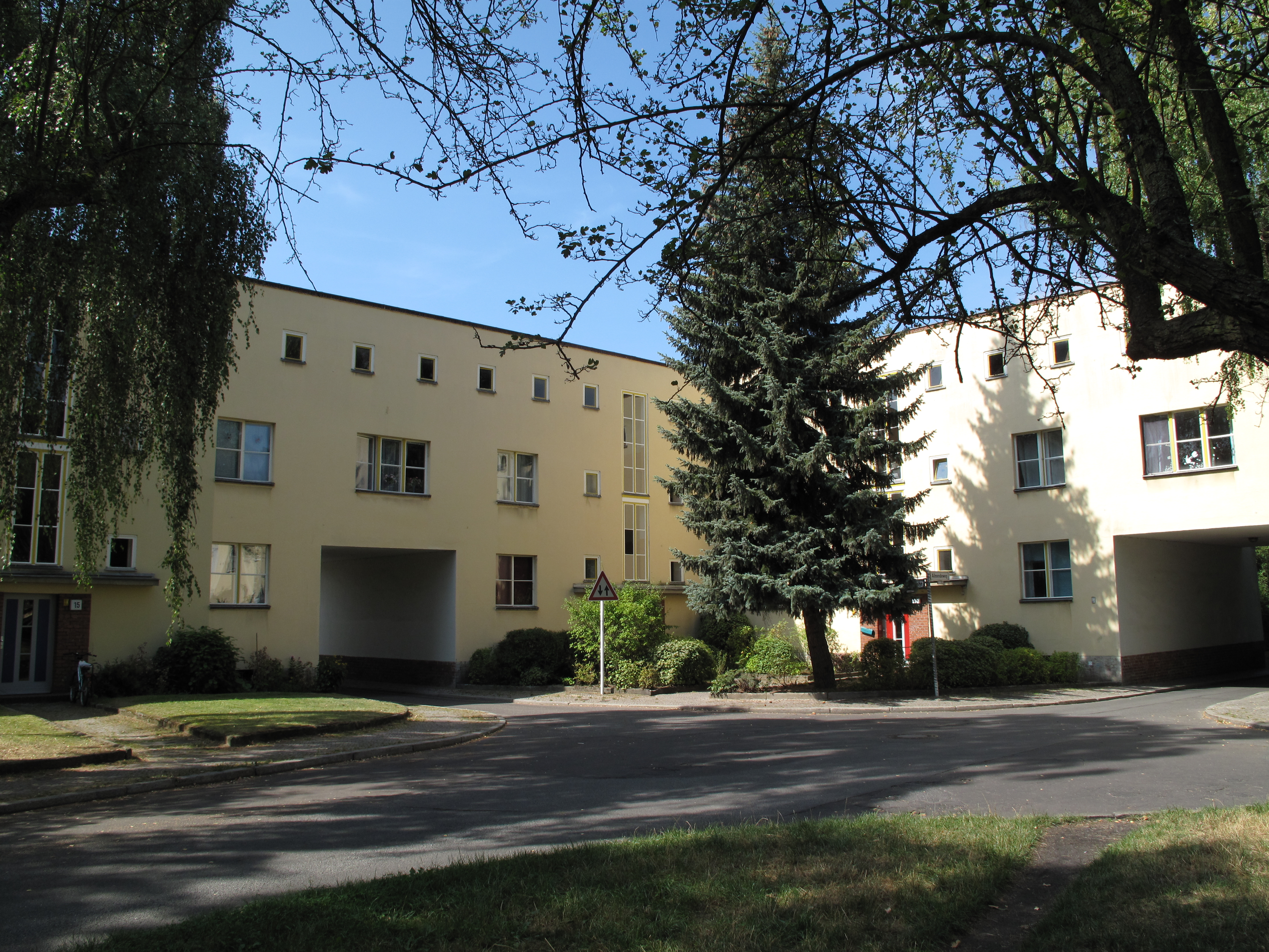 Berlin - Freie Scholle. Eckstück des Schollenhofs.